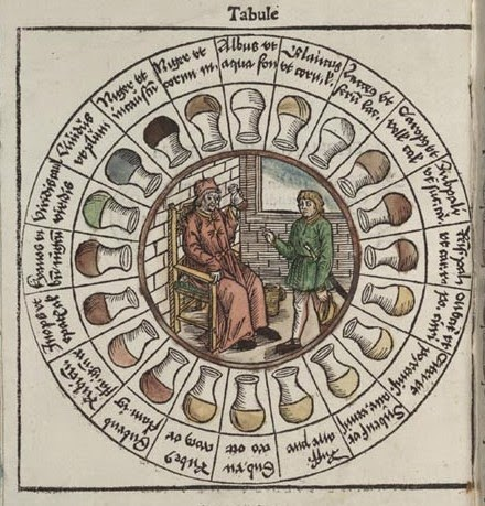 "Tabla de la orina" de la Época Mediaval